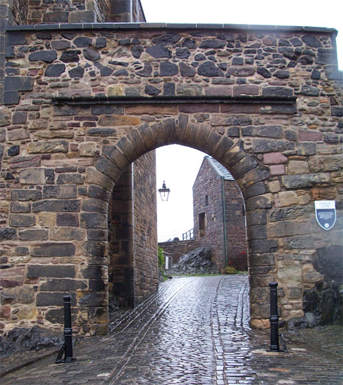 Edinburgh Castle (Scotland), Foog's Gate